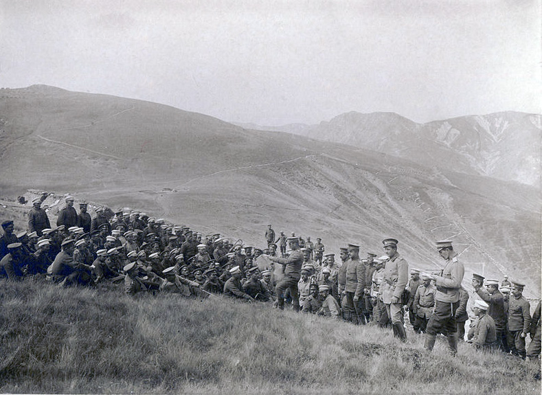 Офицери от 58-и пехотен полк. Македония, 1916-1918 г.